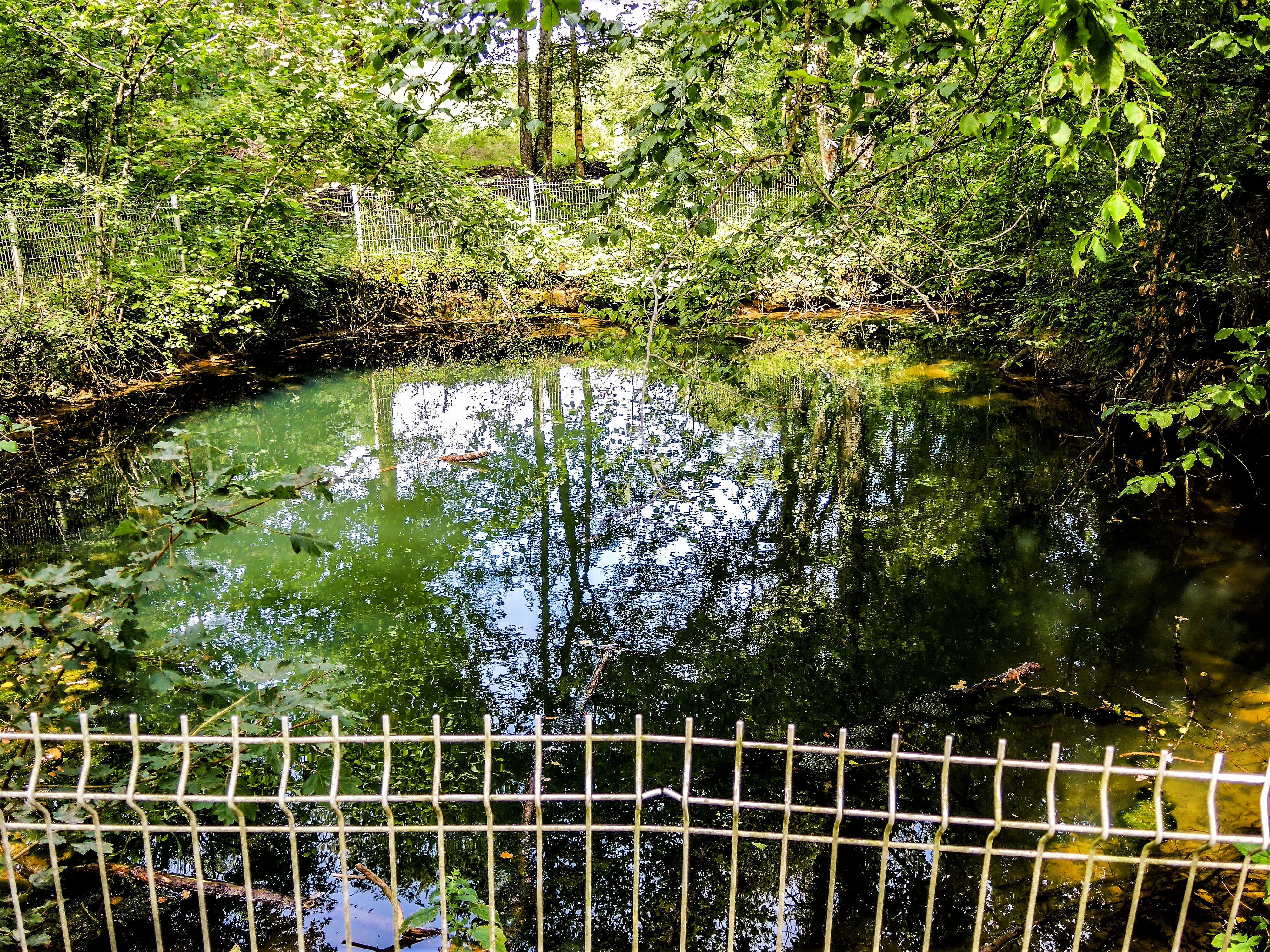 Source-résurgence du Rupt, ou trou Gavoillot